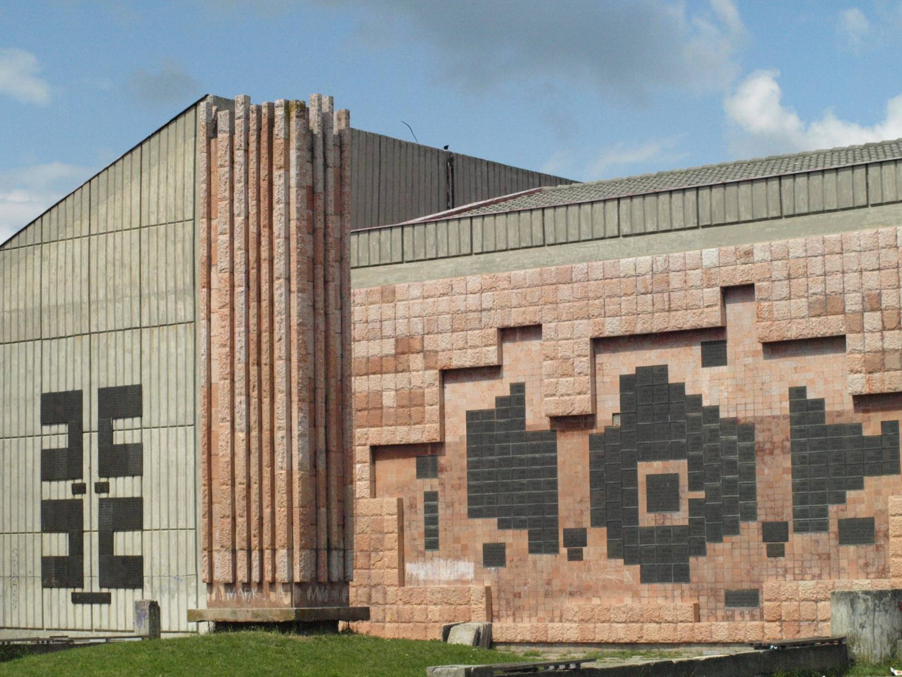 pomen-dom u Vraniću. Na zidu su pločice sa imenima poginulih meštana u prvom svetskom ratu (sa leve strane, raspoređene u obliku krsta sa ocilima), i pločice sa imenima poginulih boraca, žrtava nemačke kaznene ekspedicije i žrtava četničkog terora (desno)